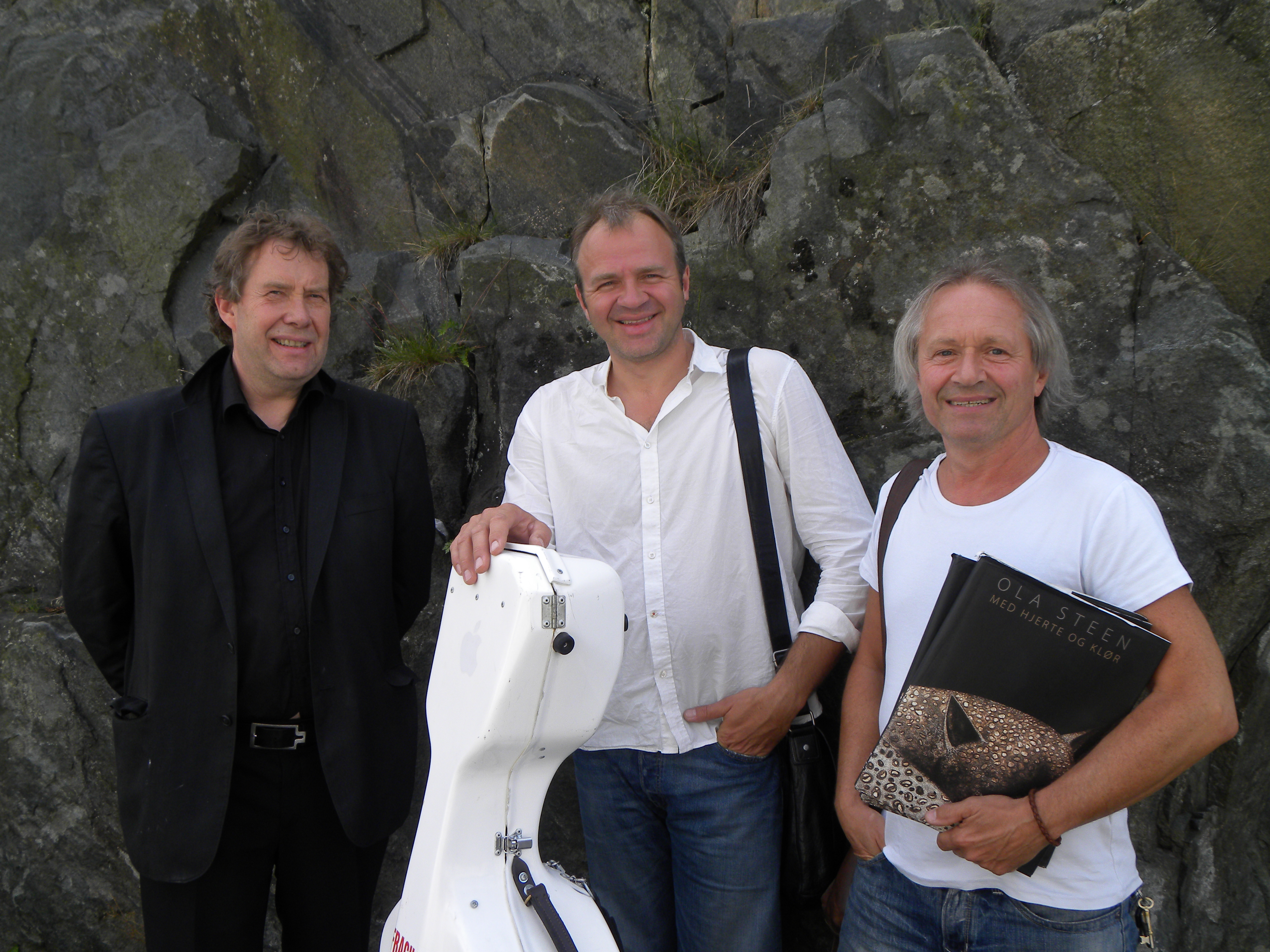 Besetningen til forestillingen «Høre månen»: Komponisten og pianisten Alfred Gammelsæter, cellisten Bård Bosrup og billedkunstneren Ola Steen. De har turnert i Aust-Agder både for den kulturelle skolesekken og den kulturelle spaserstokken. om produksjonen på Aust-Agder bibliotek og kulturformidlings nettsider knyttet til dette.